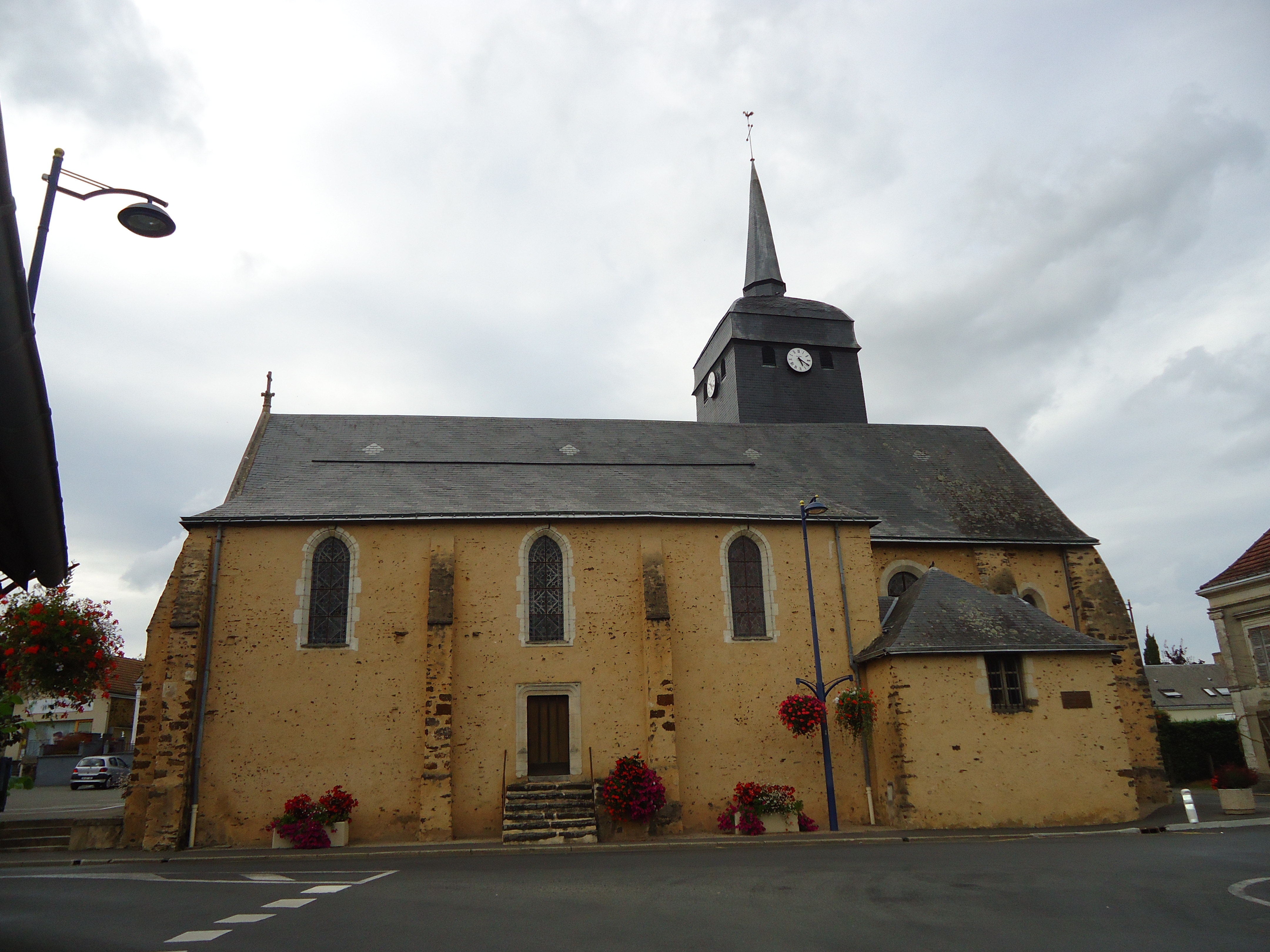 Eglise Saint-Etienne - Moncé-en-Belin - Sarthe (72)